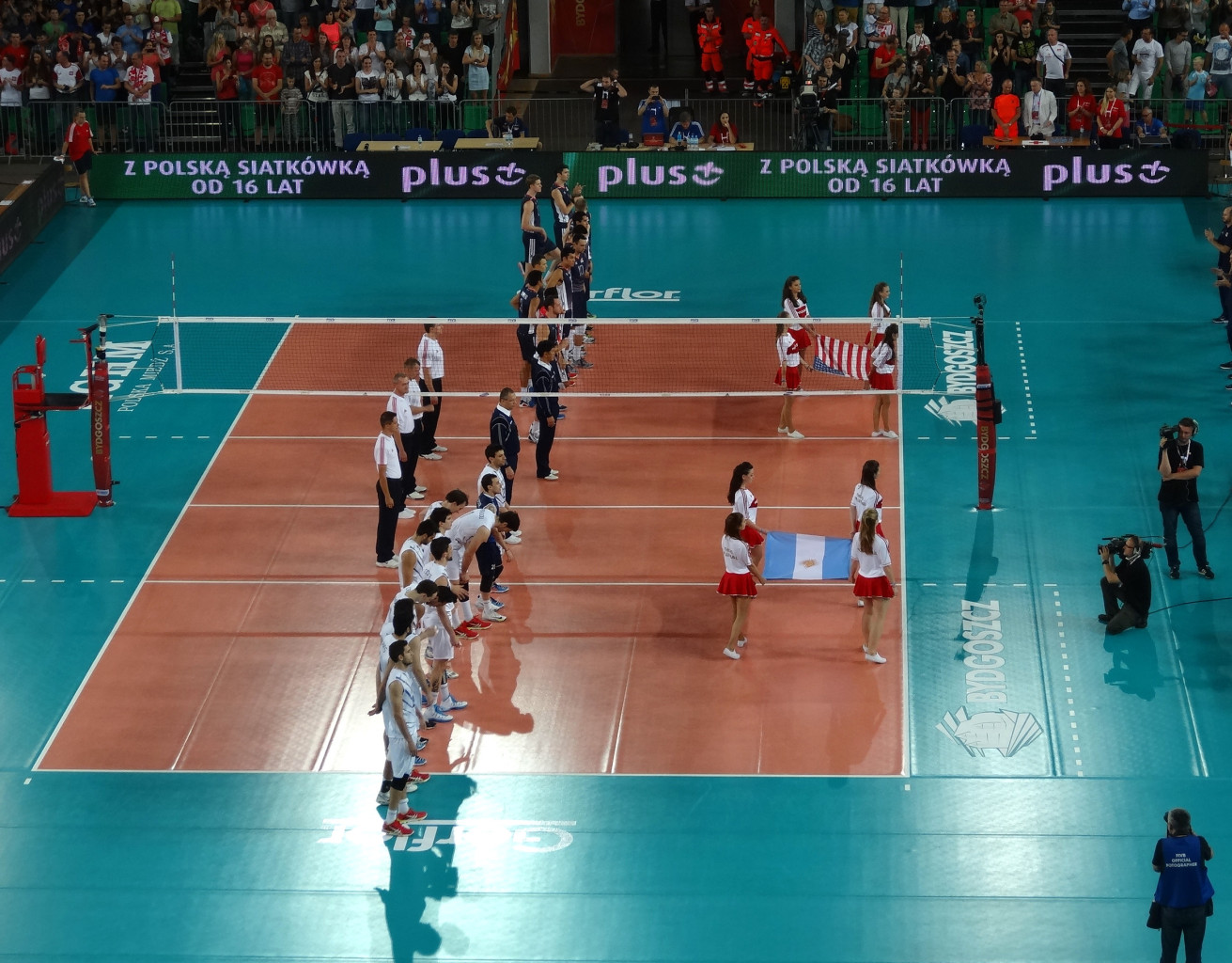 Mecz drugiej fazy grupowej Argentyna - Stany Zjednoczone (3:2) w hali widowiskowo-sportowej "Łuczniczka" w Bydgoszczy podczas Mistrzostw Świata w Piłce Siatkowej Mężczyzn 2014